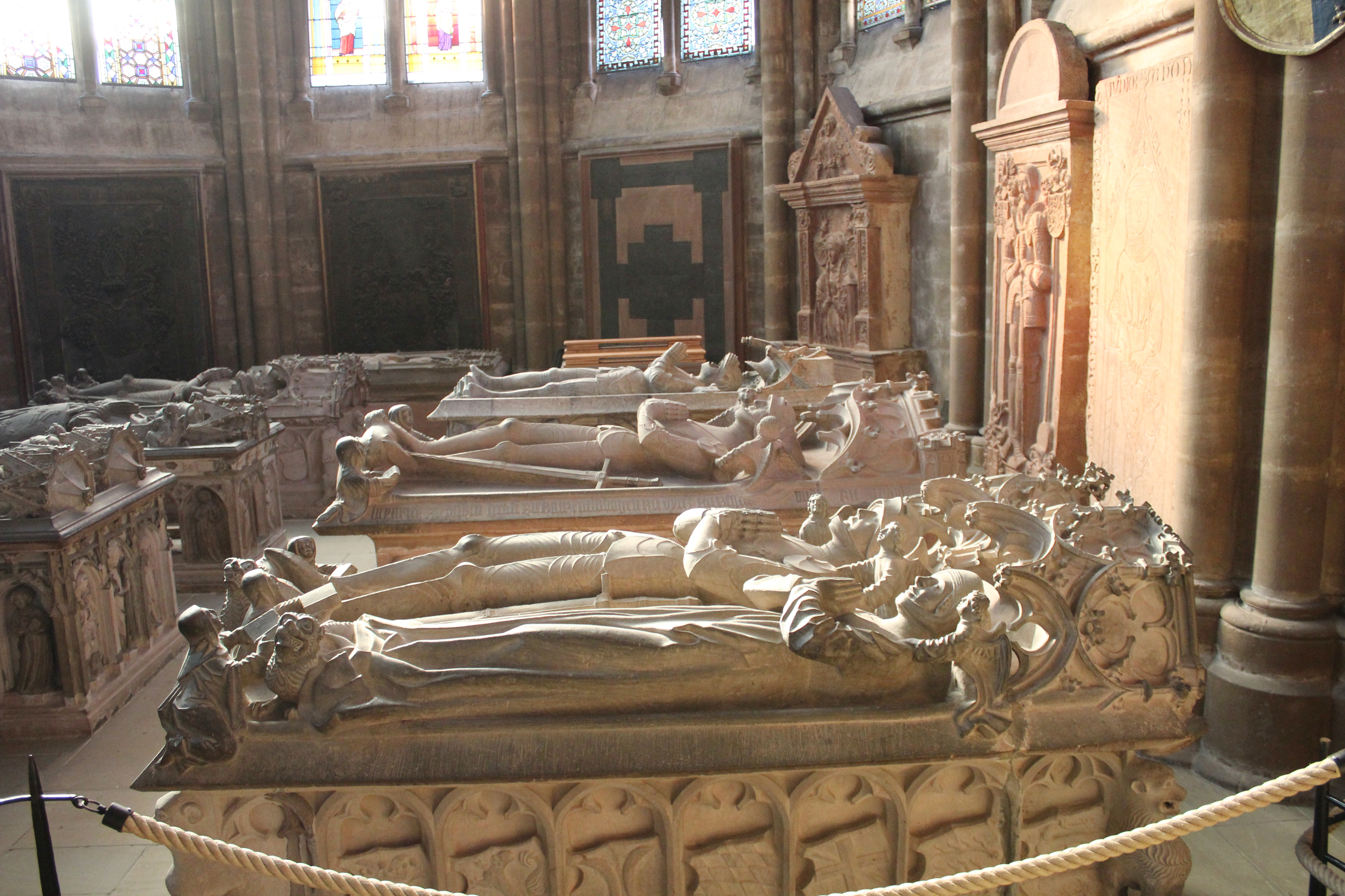 Grablege der Grafen von Hessen in der Elisabethkirche Marburg, Landkreis Marburg-Biedenkopf, Hessen, Deutschland